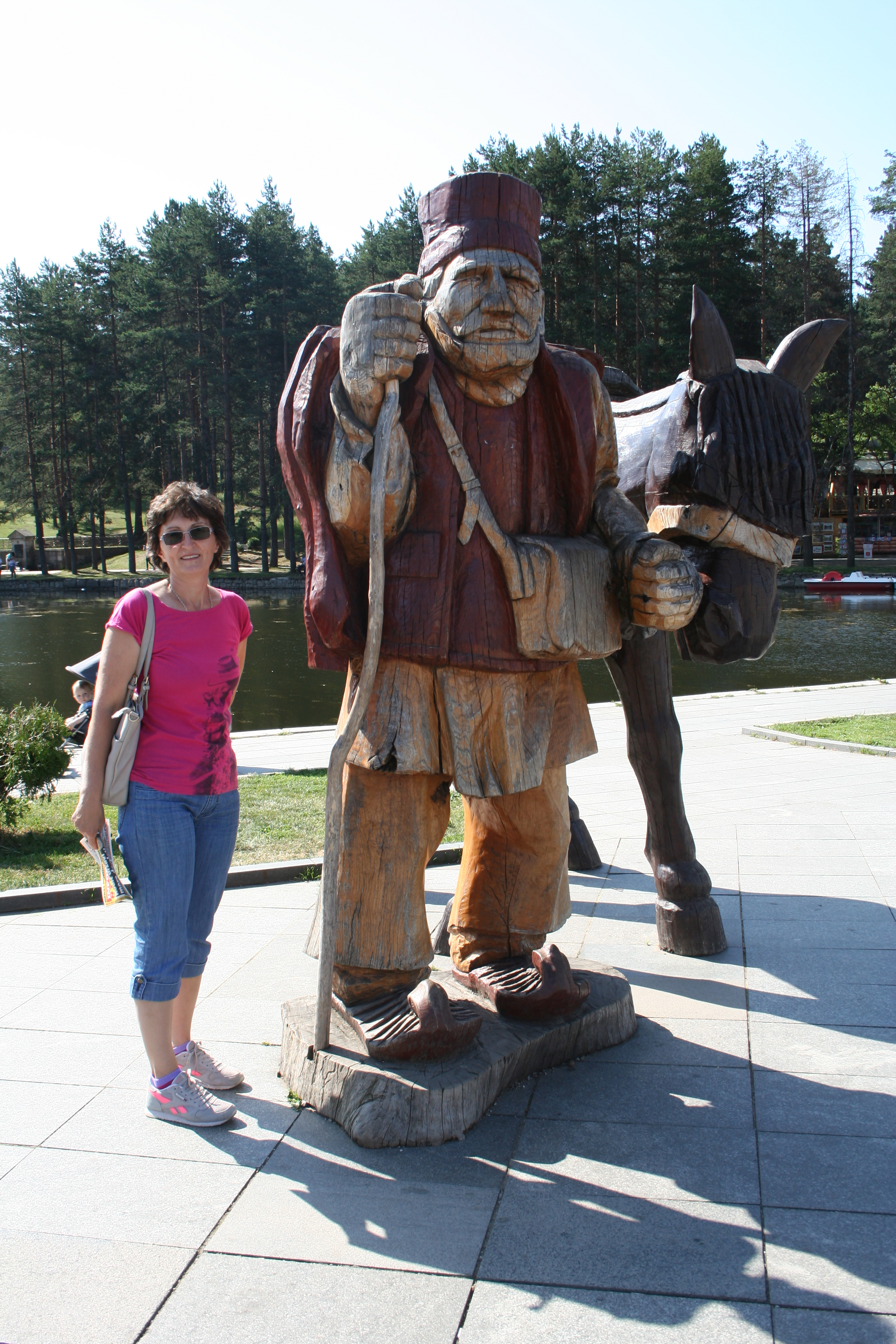 Zlatibor